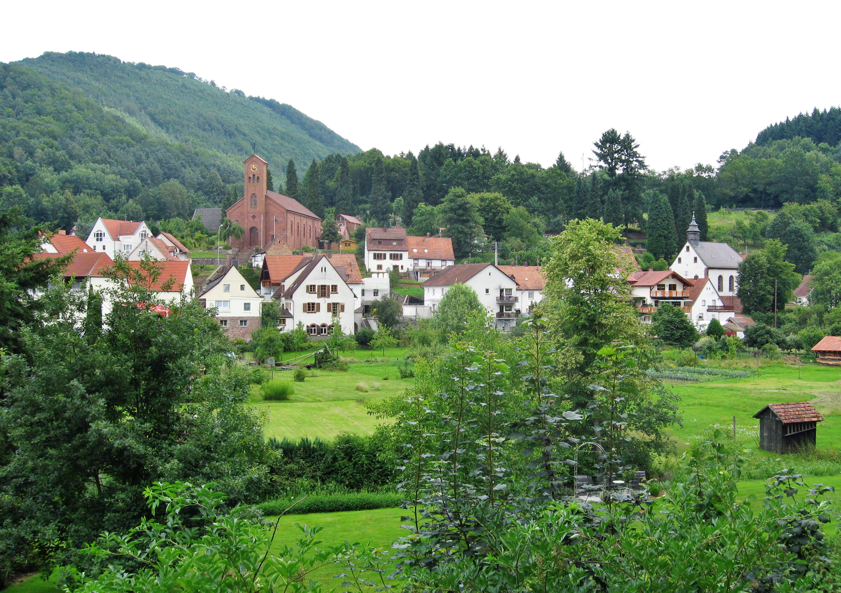 Ortsansicht